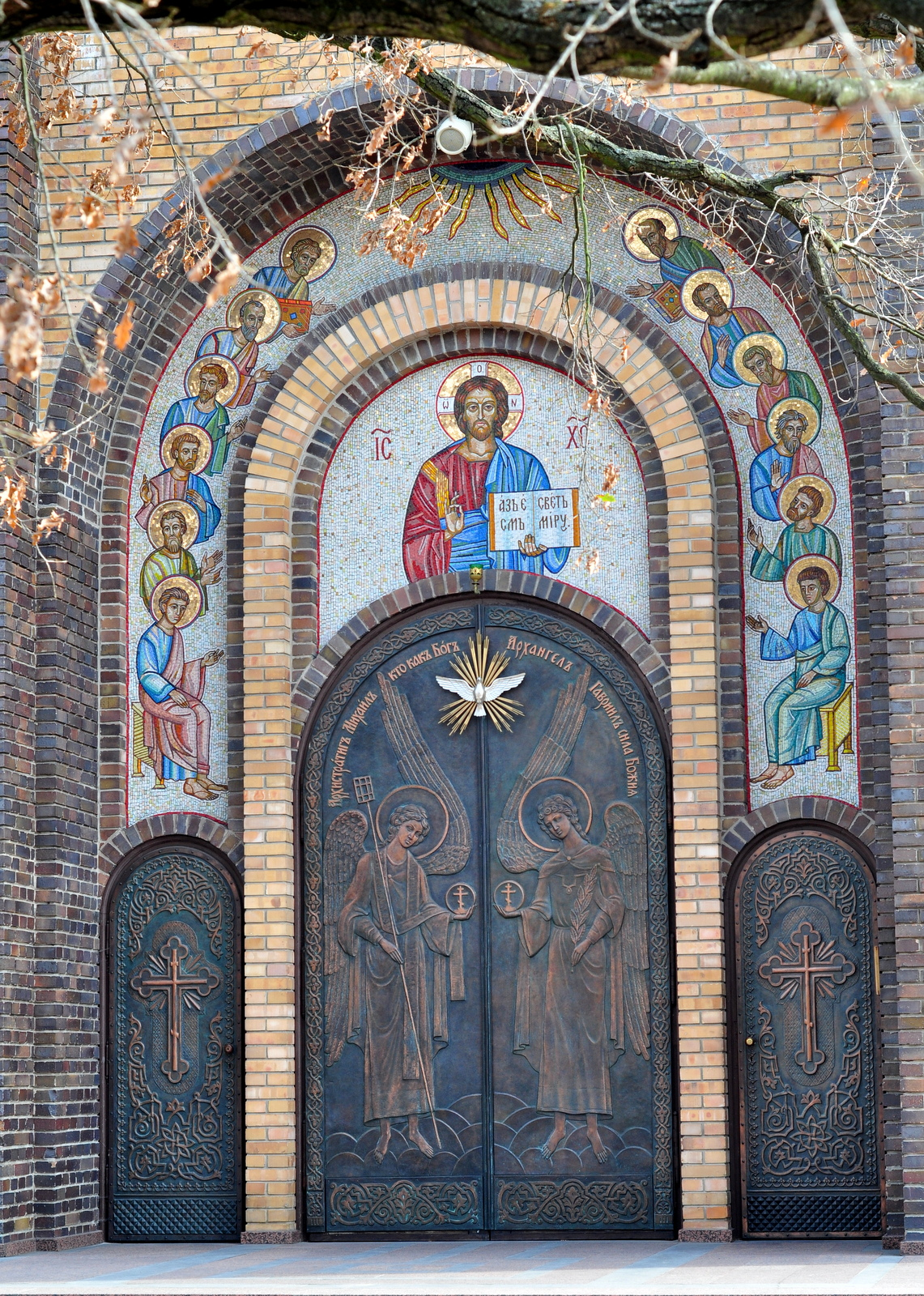 Wejście do Cerkwi Świętego Ducha w Białymstoku